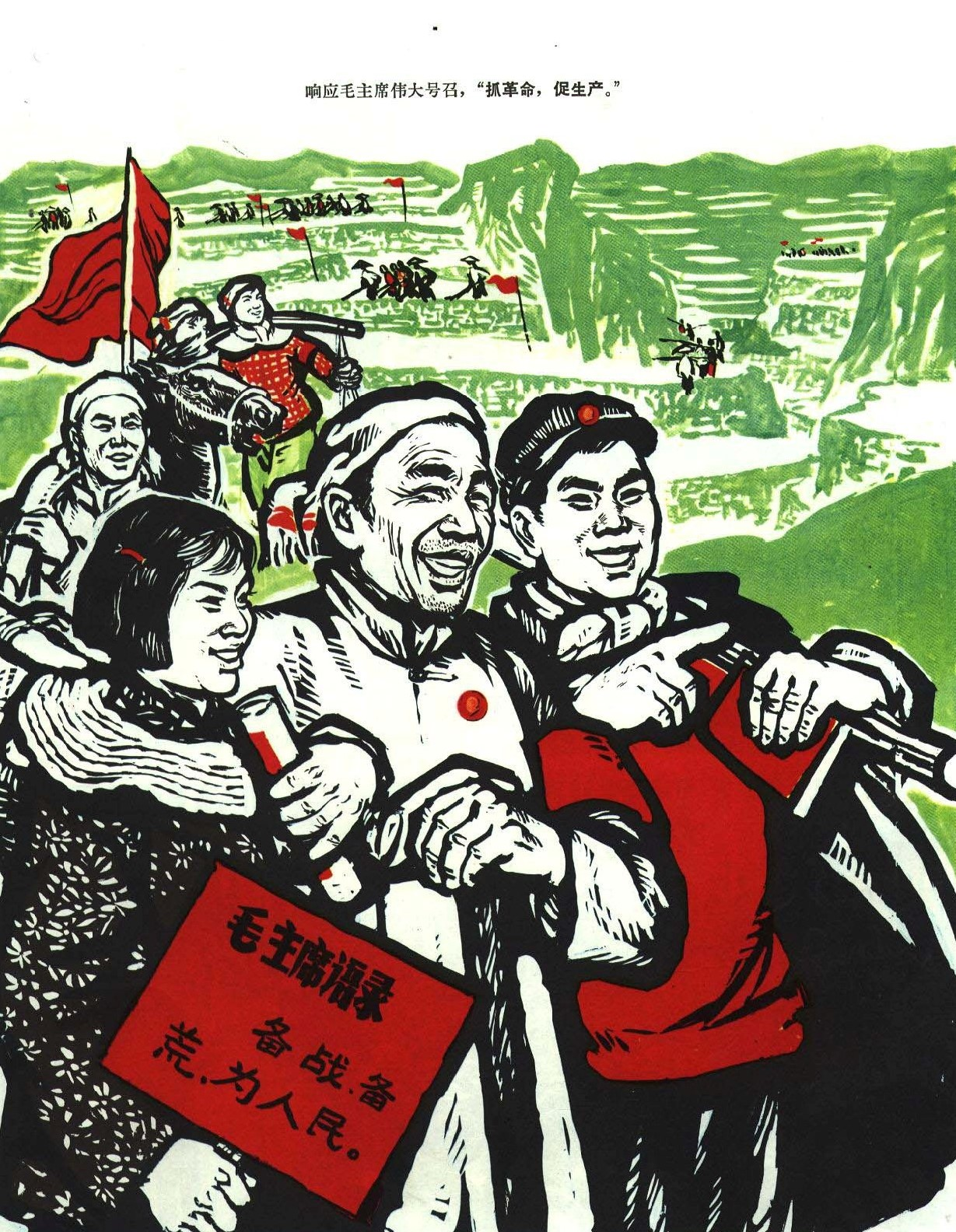 1967-05 抓革命促生产海报